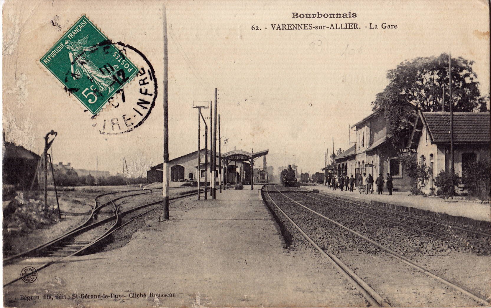 Carte postale ancienne éditée par Béguin fils à St-Gérand-le-Puy, cliché Rousseau, n°62 :VARENNES-SUR-ALLIER - La Gare